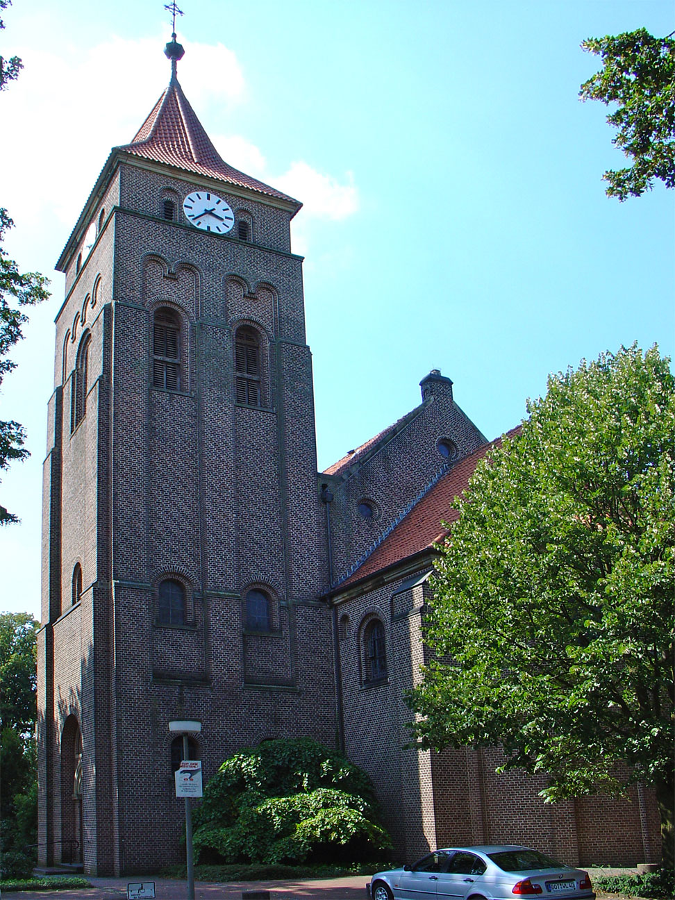 Sint Jacobskerk van Oeding